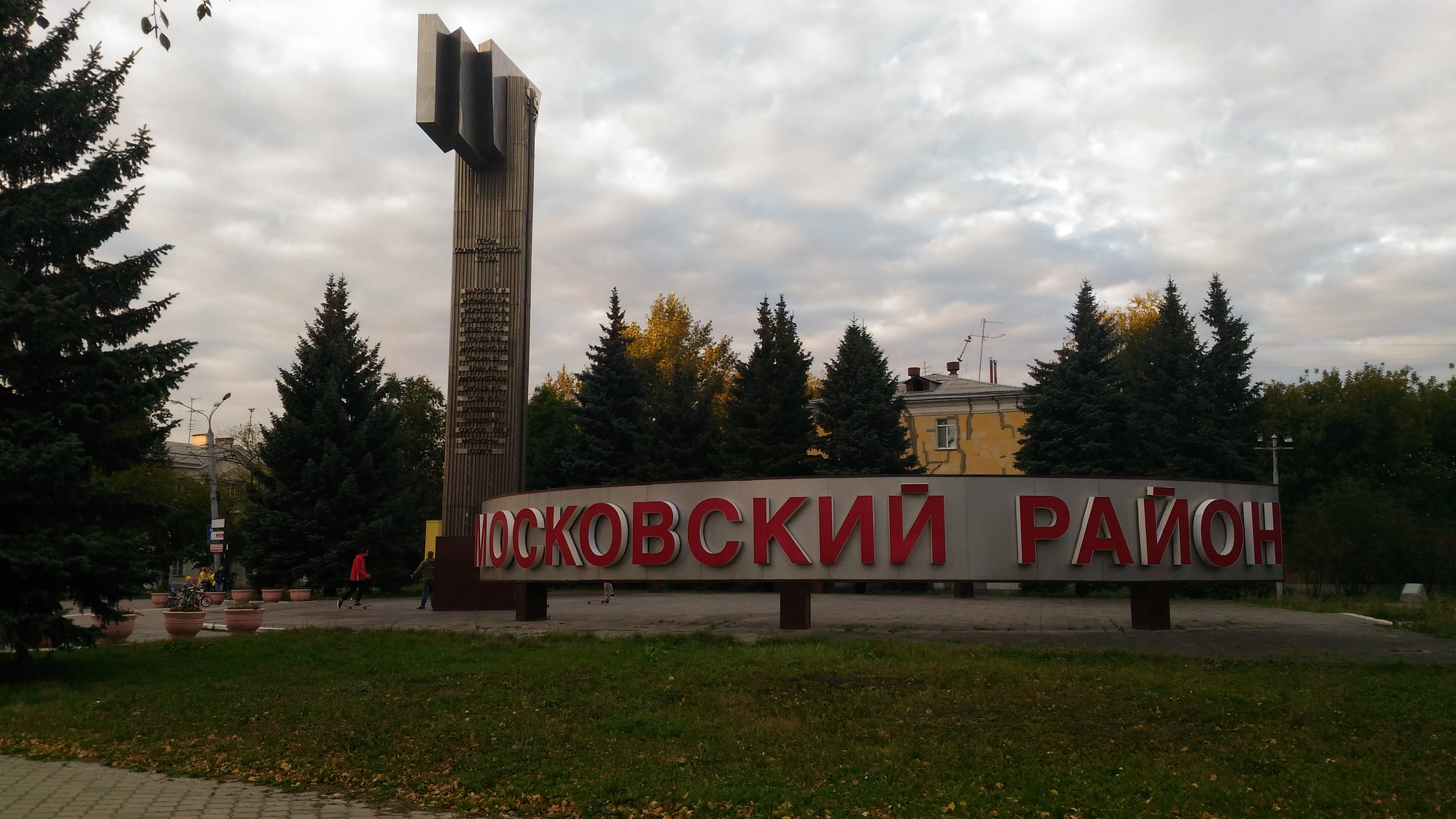 Нижний Новгород, площадь Героев. Мемориал Героям Советского Союза и Героям Труда (1974 г.)